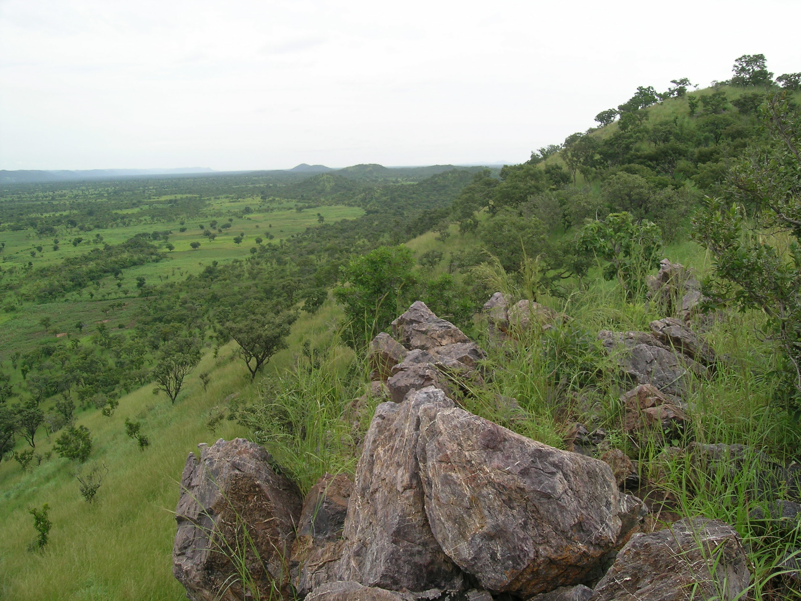 Ausläufer der Atakora-Gebirgskette, Blick Richtung S-W auf die Atakora-Kette am linken Bildrand und Ausläufer südlich außerhalb des Pendjari-Nationalparks in der Nähe von Batia, Benin